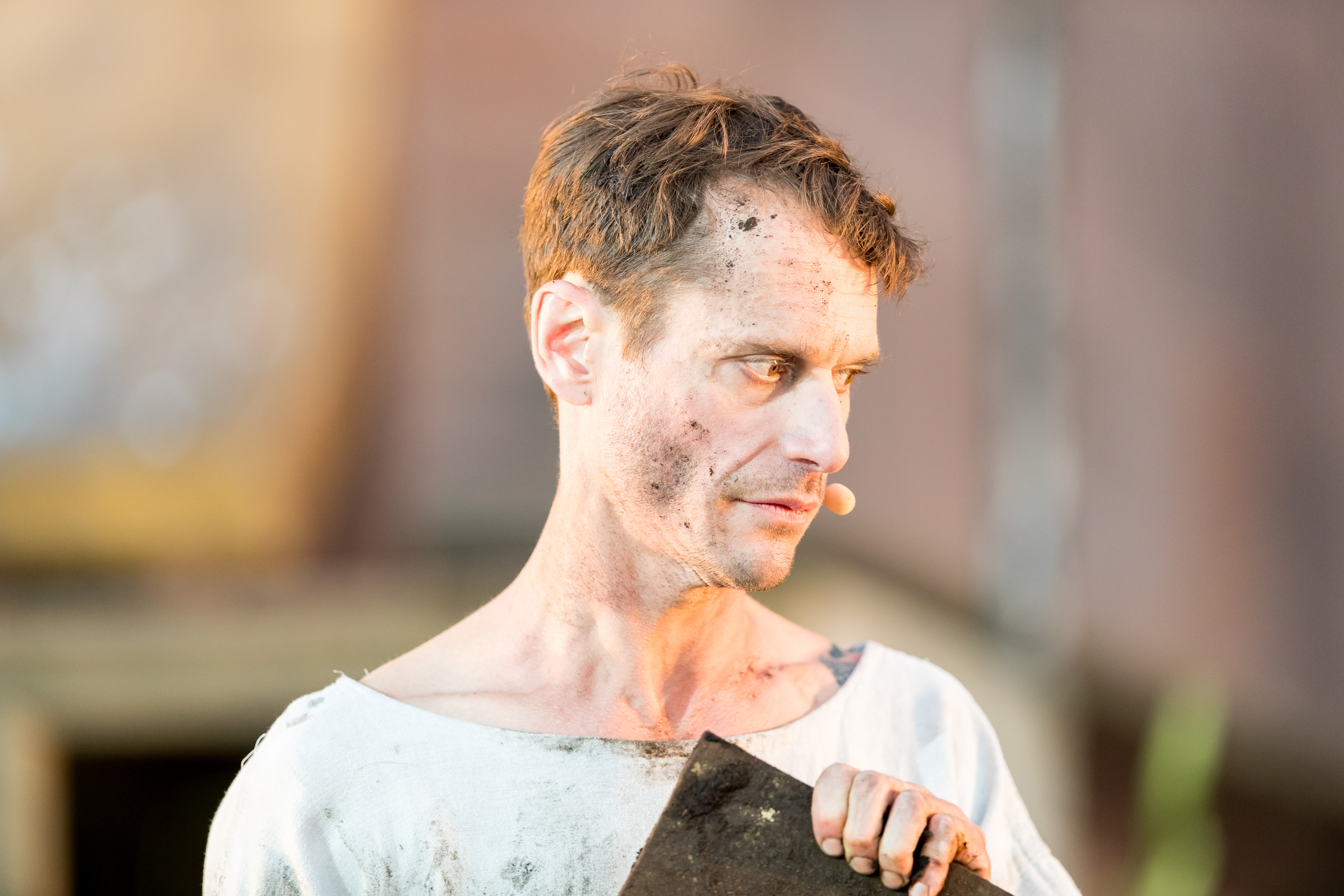 Max Mayer during Nibelungenfestspiele "Siegfrieds Erben" at Wormser Dom, Worms, Rheinland-Pfalz, Germany on 2018-07-19, Photo: Sven Mandel